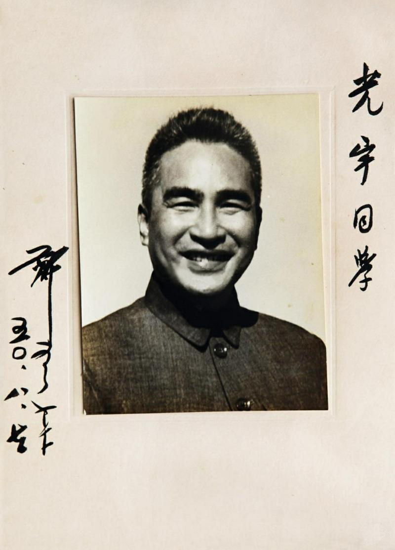 鄭彥棻